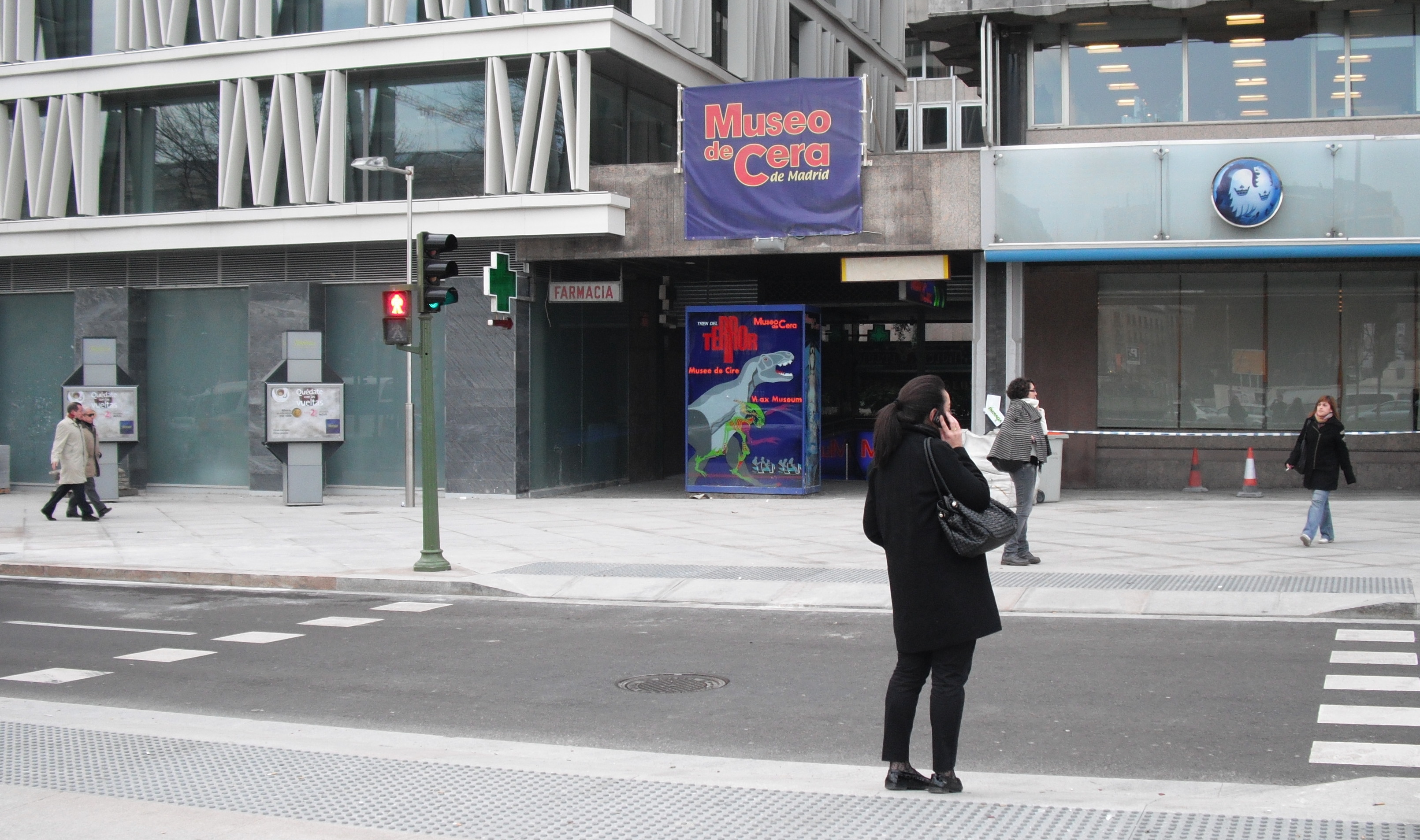 Museo de Cera Plaza de Colón Madrid Comunidad de Madrid España